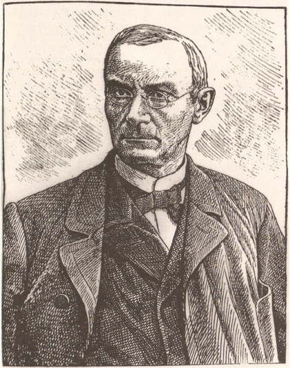 Georg Ratzinger (1844-1899), Priester und Bayerischer Landtagsabgeordneter, Großonkel von Papst Benedikt XVI.